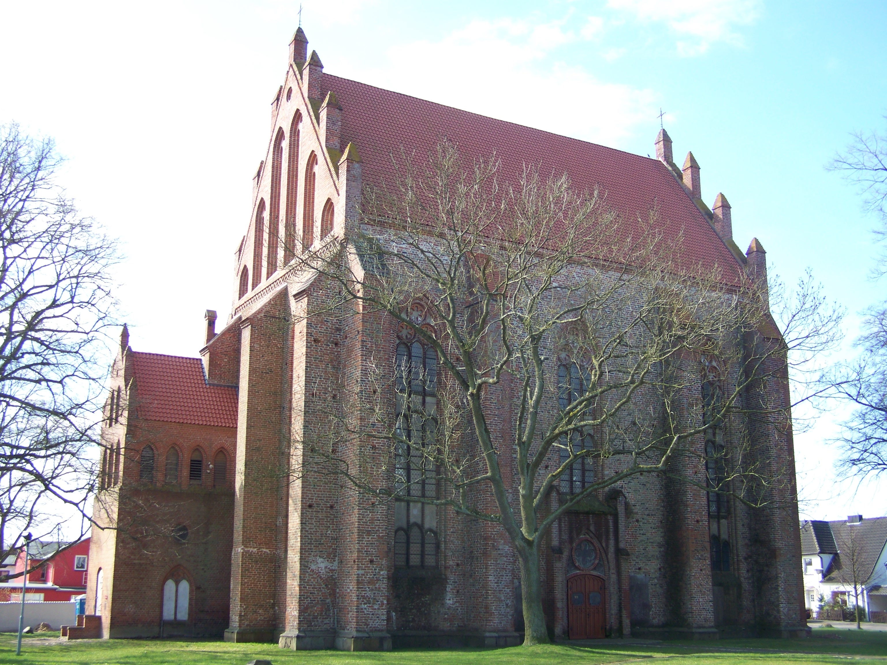 Franzburg, Kirche - Seitenansicht (2008-04-20)